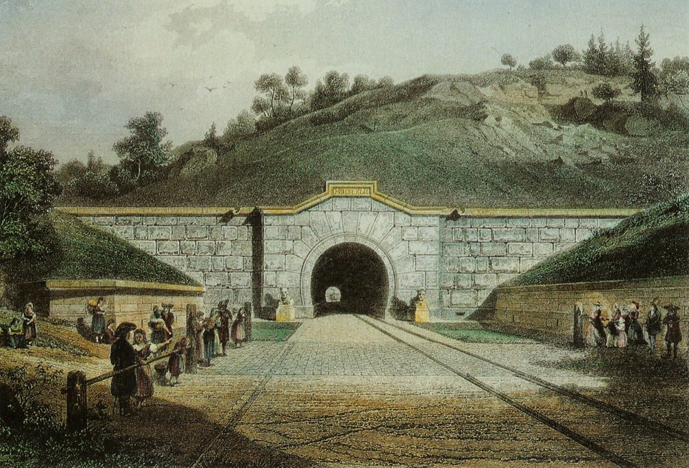 Burgbergtunnel in Erlangen. Kolorierte Lithographie von M. Kolb nach Carl August Lebschée